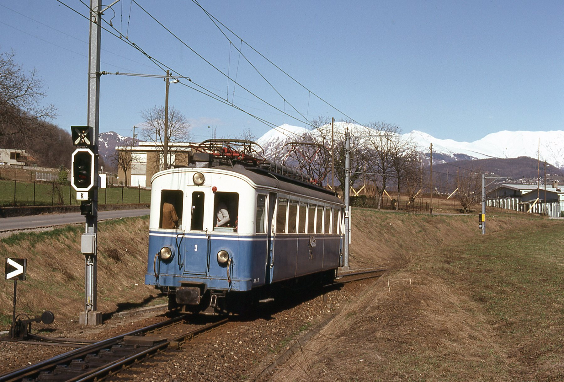 Elettromotrice 3 in servizio sulla ferrovia Lugano-Ponte Tresa